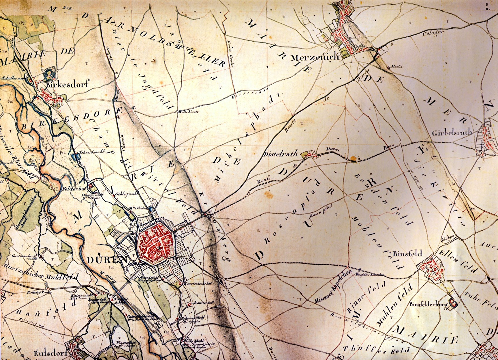 Kartenaufnahme der Rheinlande (Blatt 89, Düren; Ausschnitt)